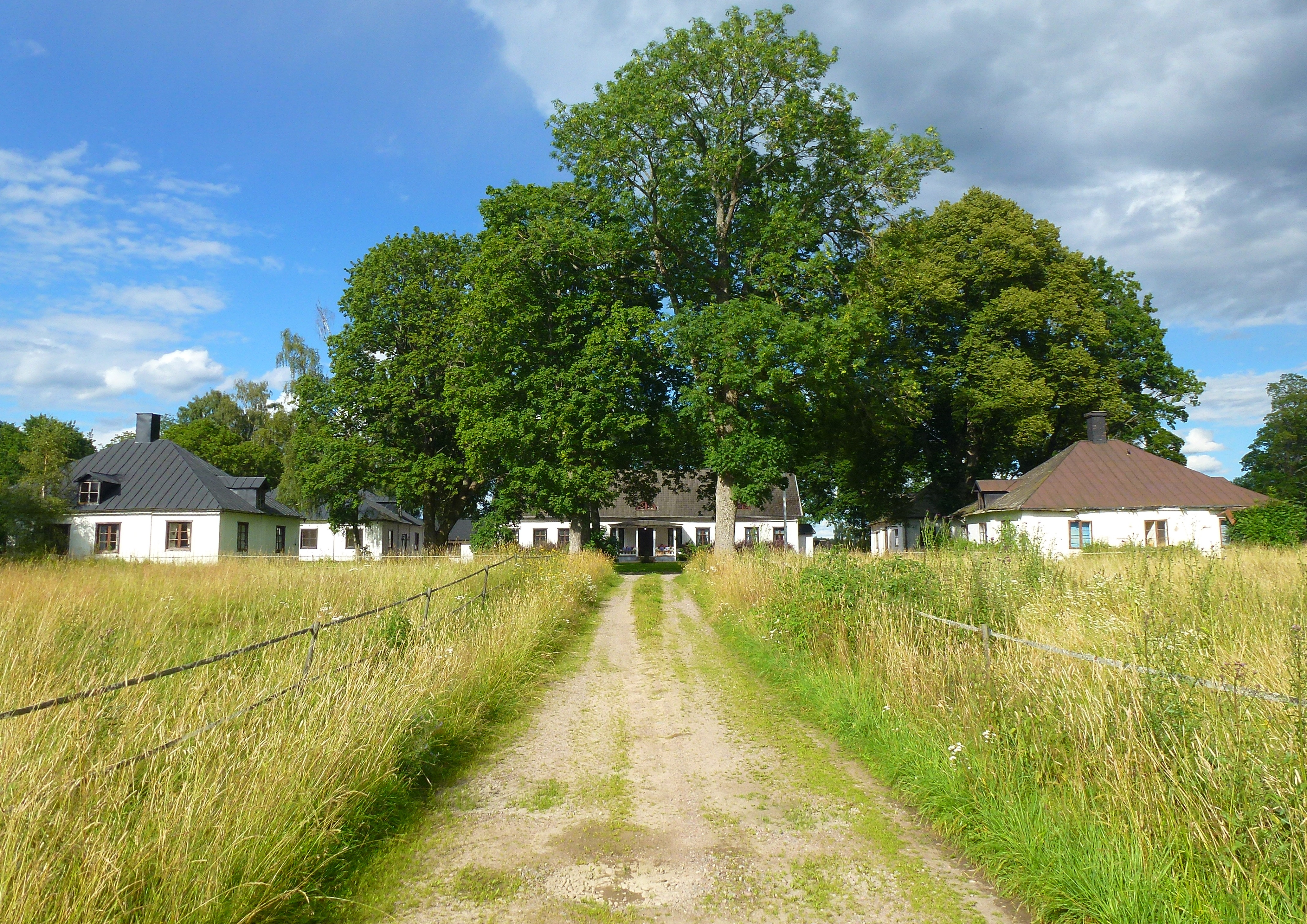 Näs kungsgård